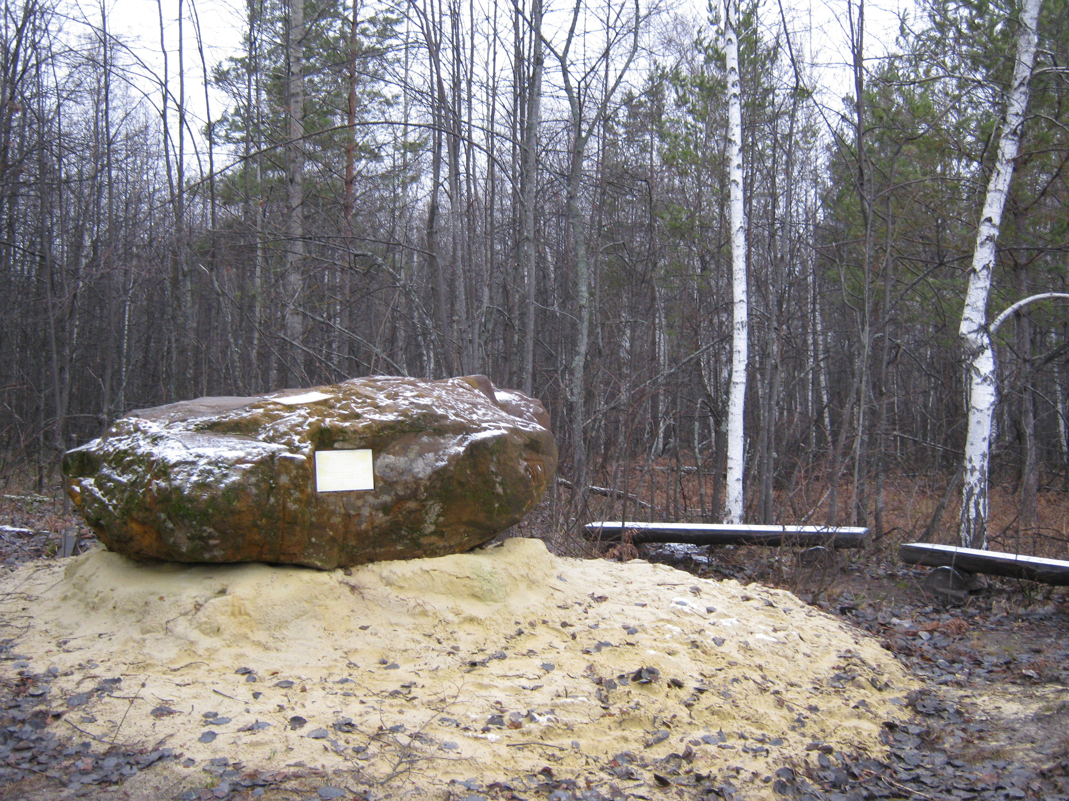 Наивысшая точка Пензенской области находится в Кузнецком районе